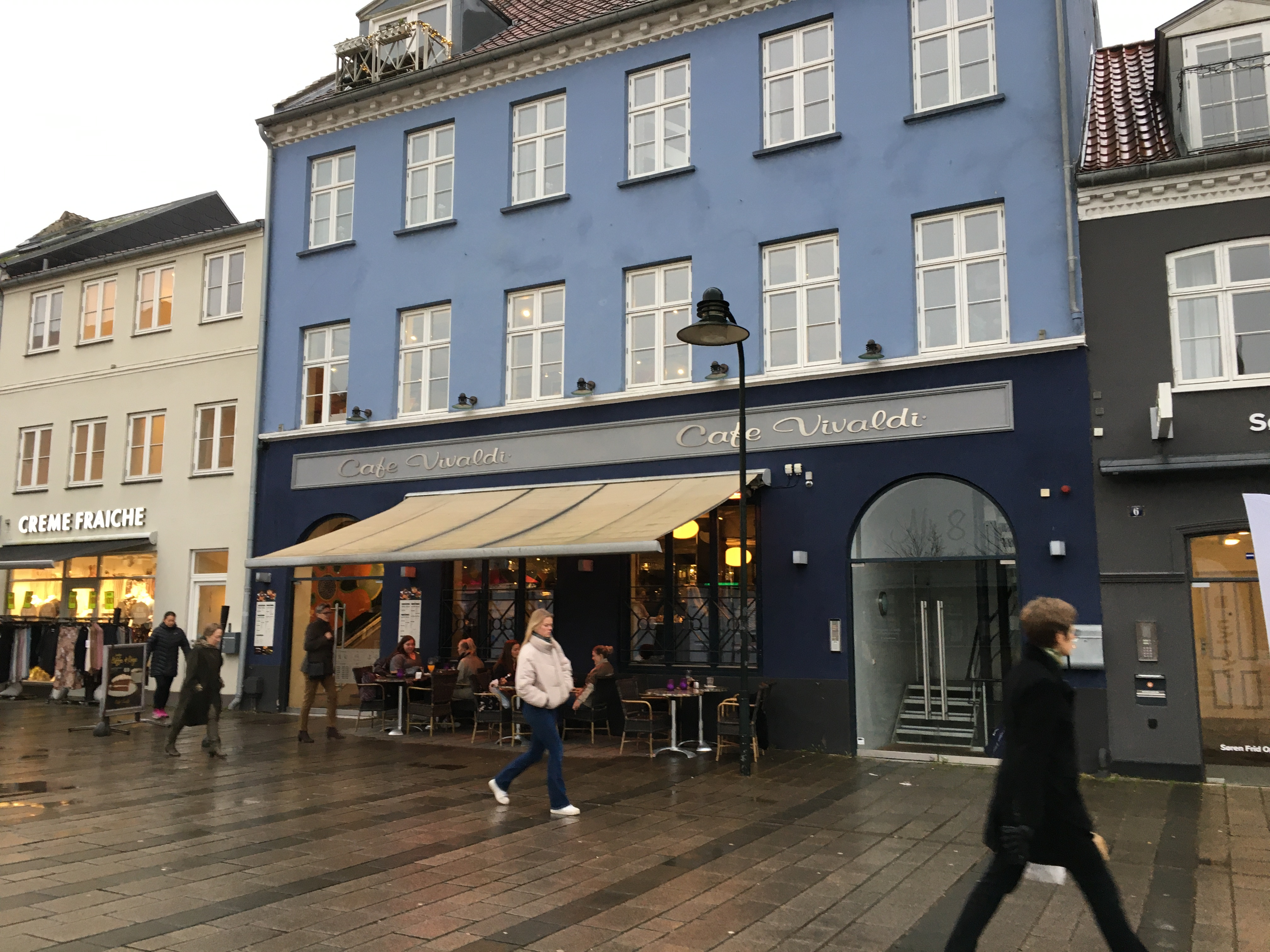 Café Vivaldi i Roskilde. Ud til Stændertorvet